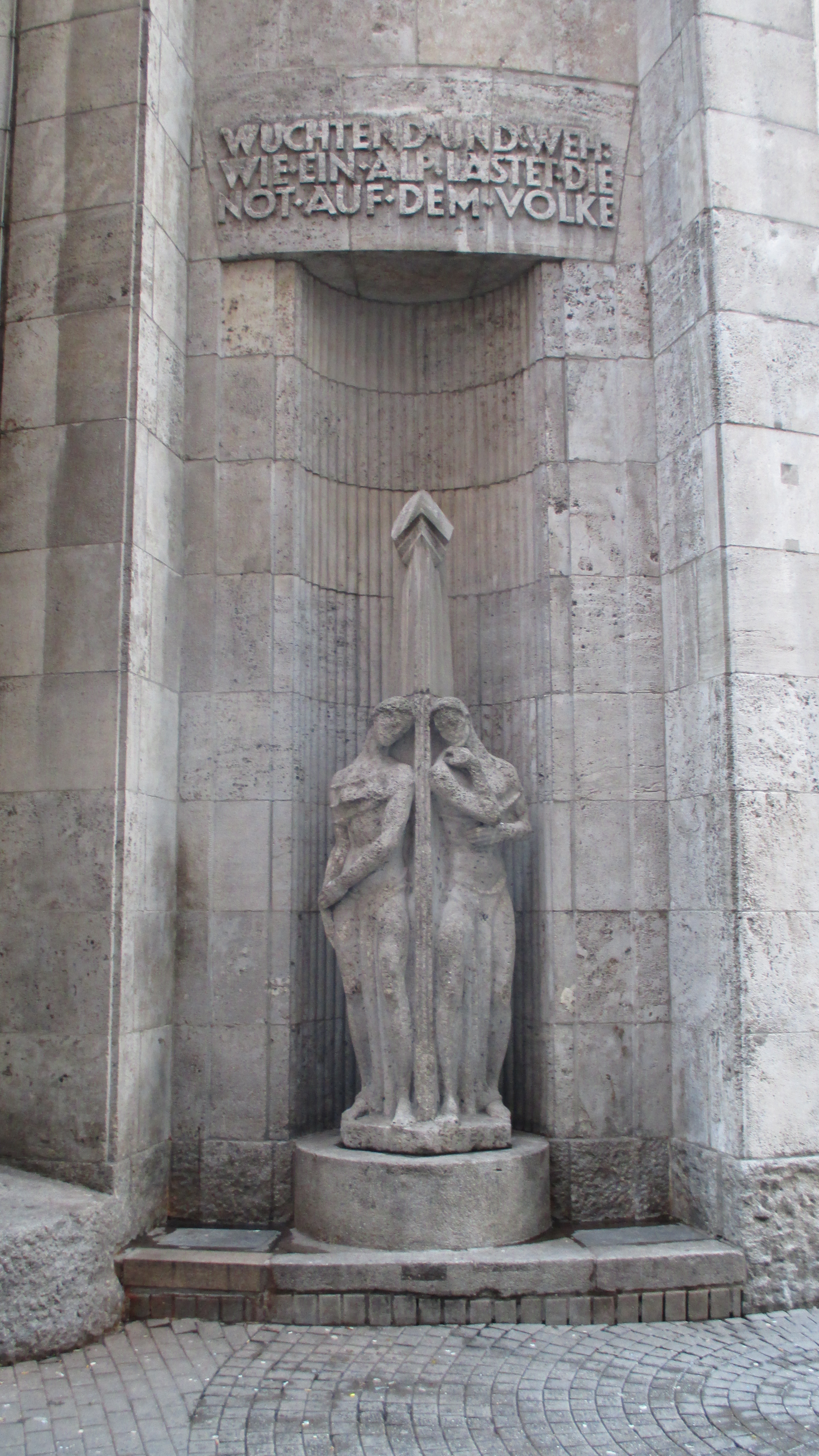 Skulptur "Die Trauernden" von Fritz Bagdon aus dem Jahr 1924 am Museum für Kunst und Kulturgeschichte in Dortmund.